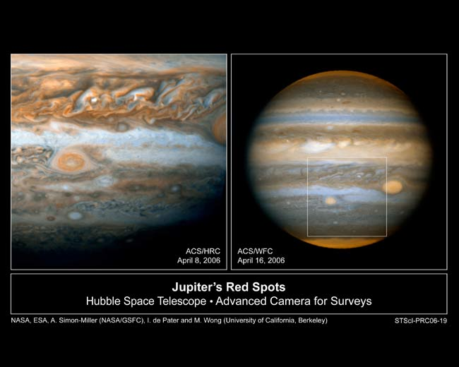 Hubble foto van de kleine rode vlek van Jupiter.